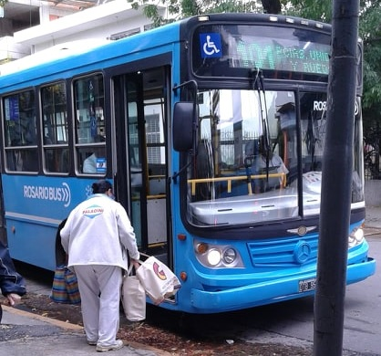 Mercedes-Benz O 500 de la empresa Rosario Bus, explotadora de la línea 101